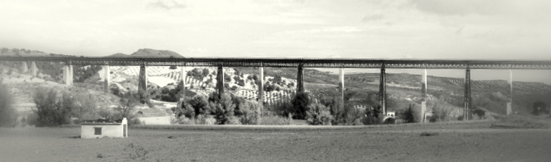 Viaducto del Hacho. Noviembre de 2010